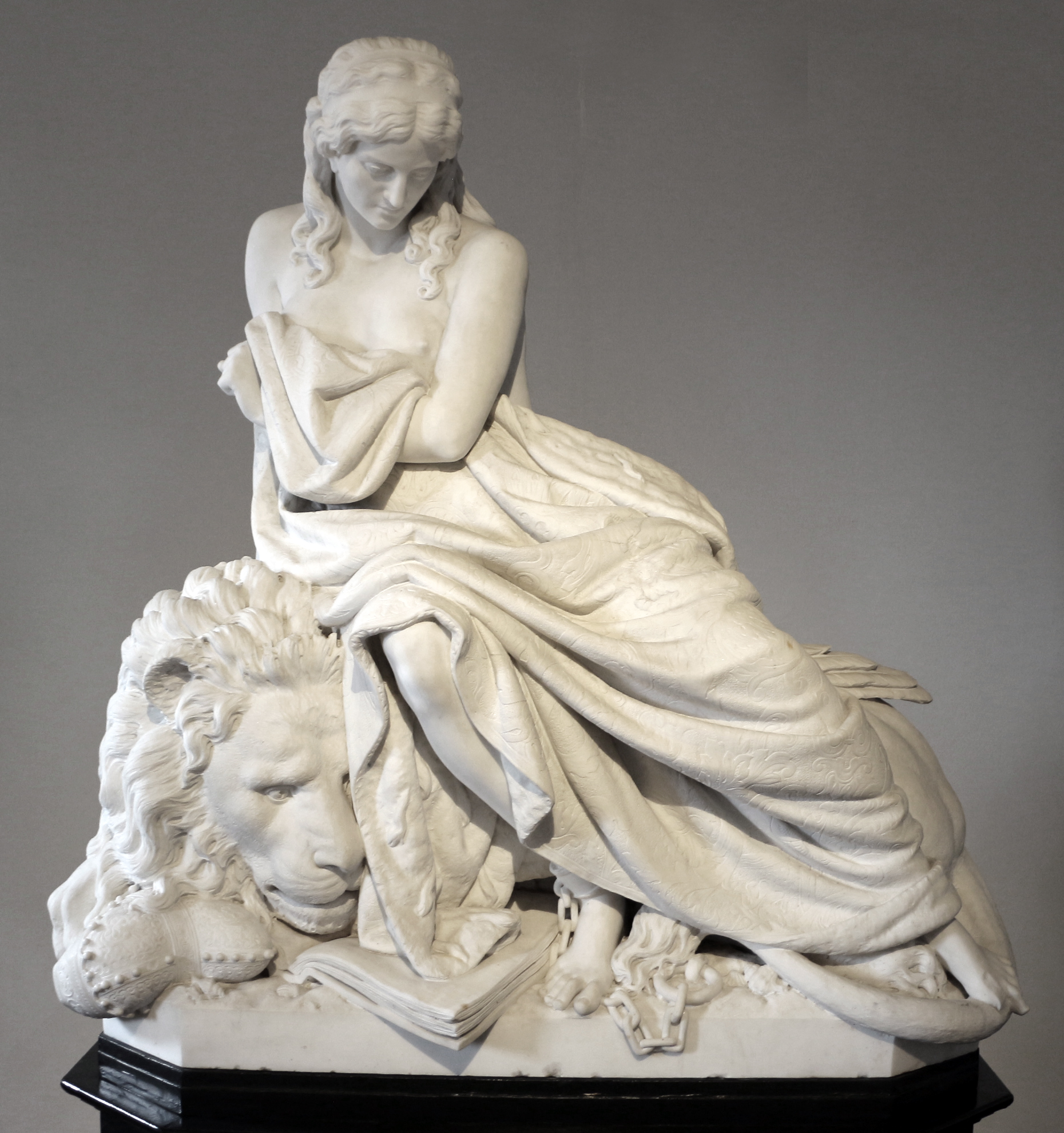 Museo nazionale di Ravenna This is a photo of a monument which is part of cultural heritage of Italy.